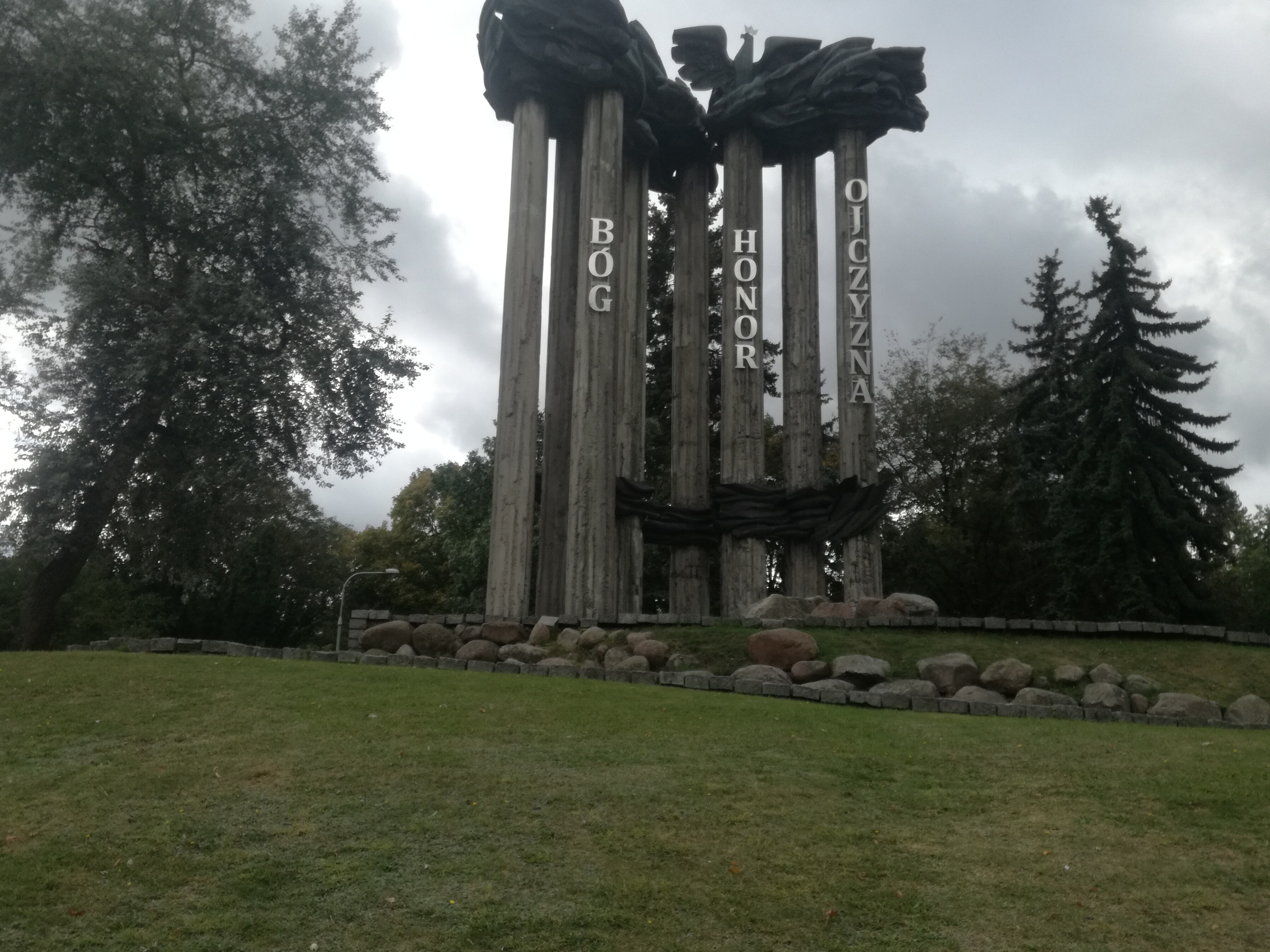 Pomnik Bohaterów Ziemi Białostockiej w Białymstoku